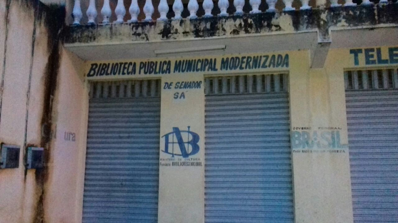 Vista externa do prédio da Biblioteca Pública Municipal de Senador Sá.